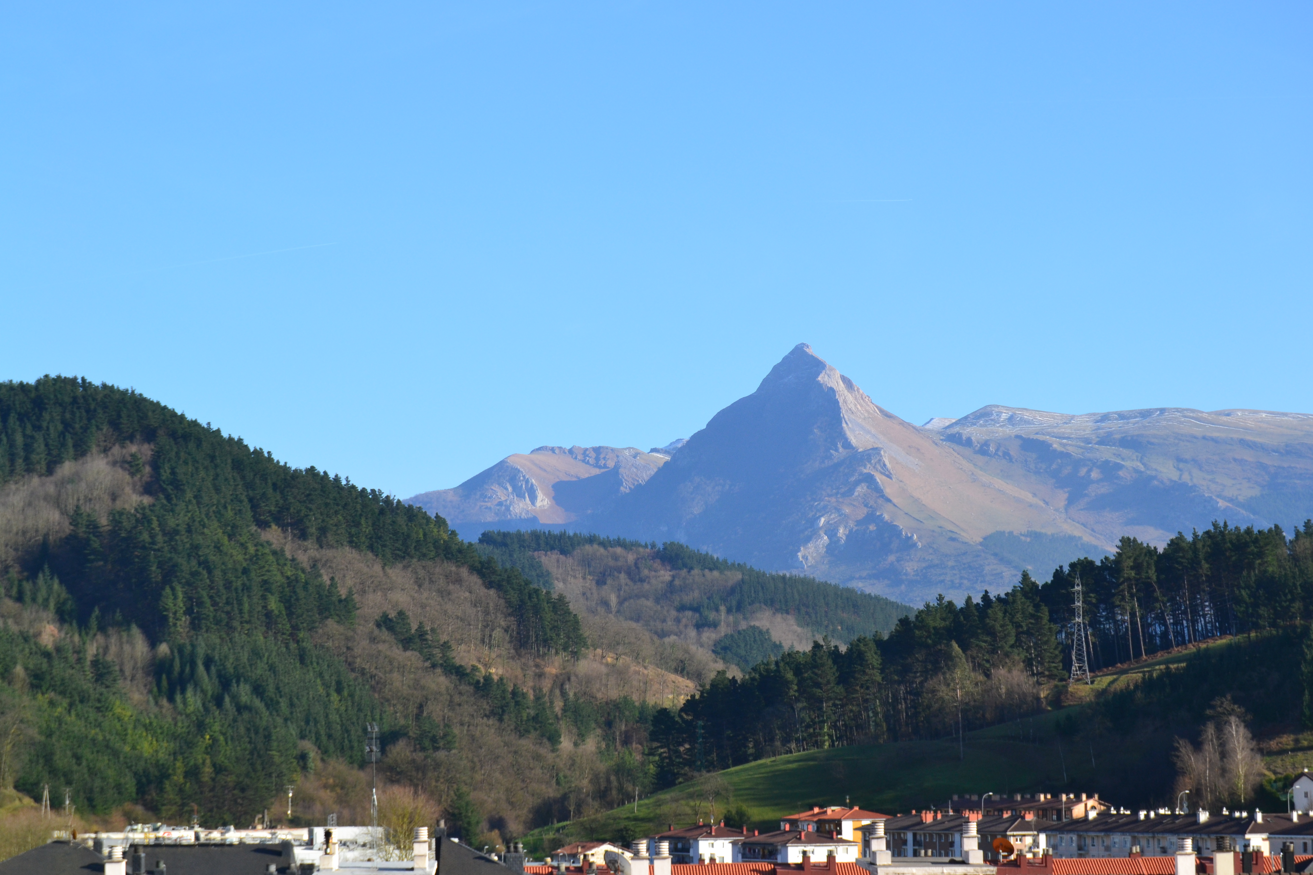 Txindoki mendiaren ikuspegia Ordizia udalerritik. Gipuzkoa, Euskal Herria. View of Txindoki mountain from Ordizia village. Gipuzkoa, Basque Country.